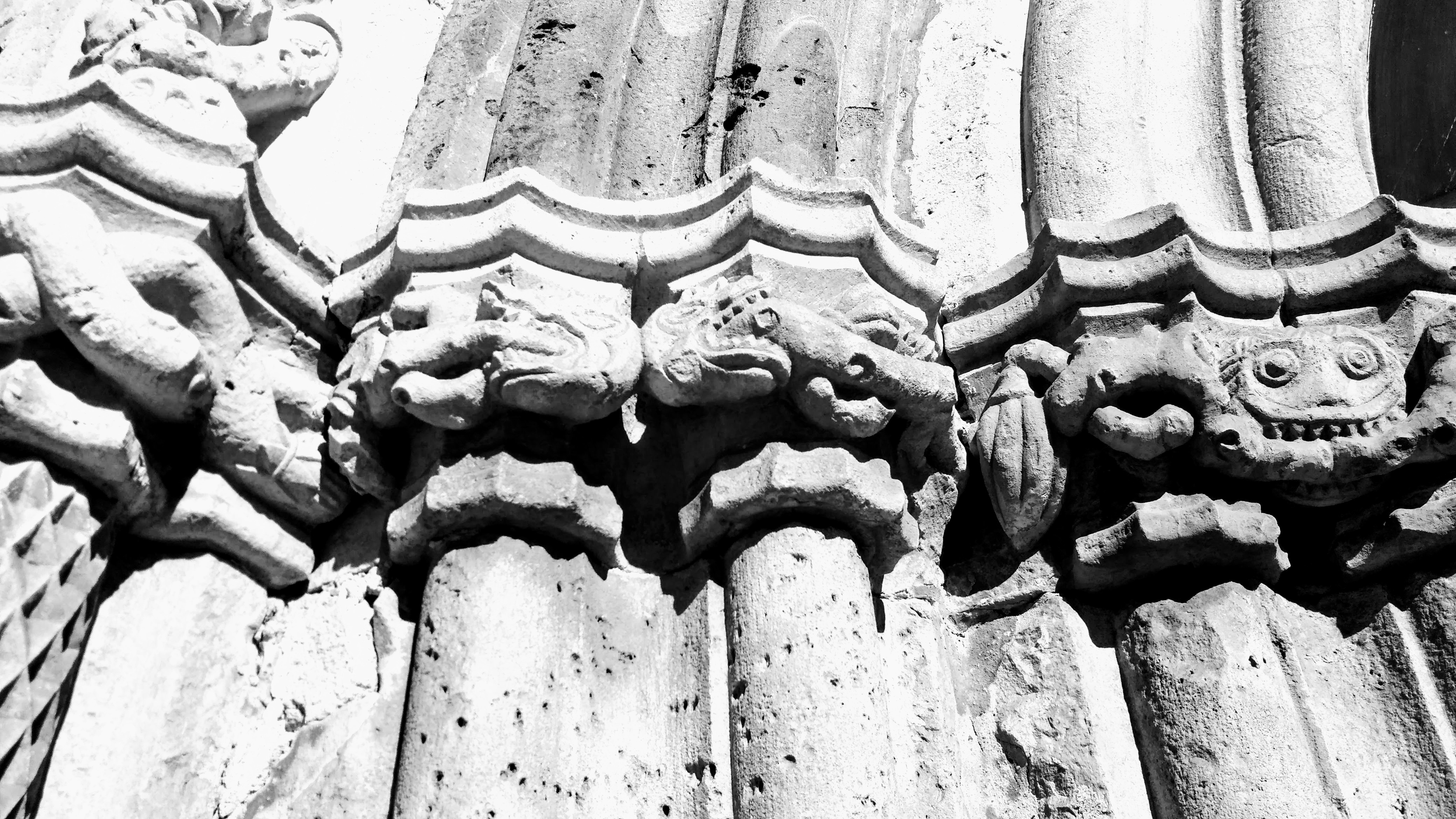 Pormenor do friso gótico do pórtico da Igreja da Conceição de Tavira, com dragões, carrancas e frutos.